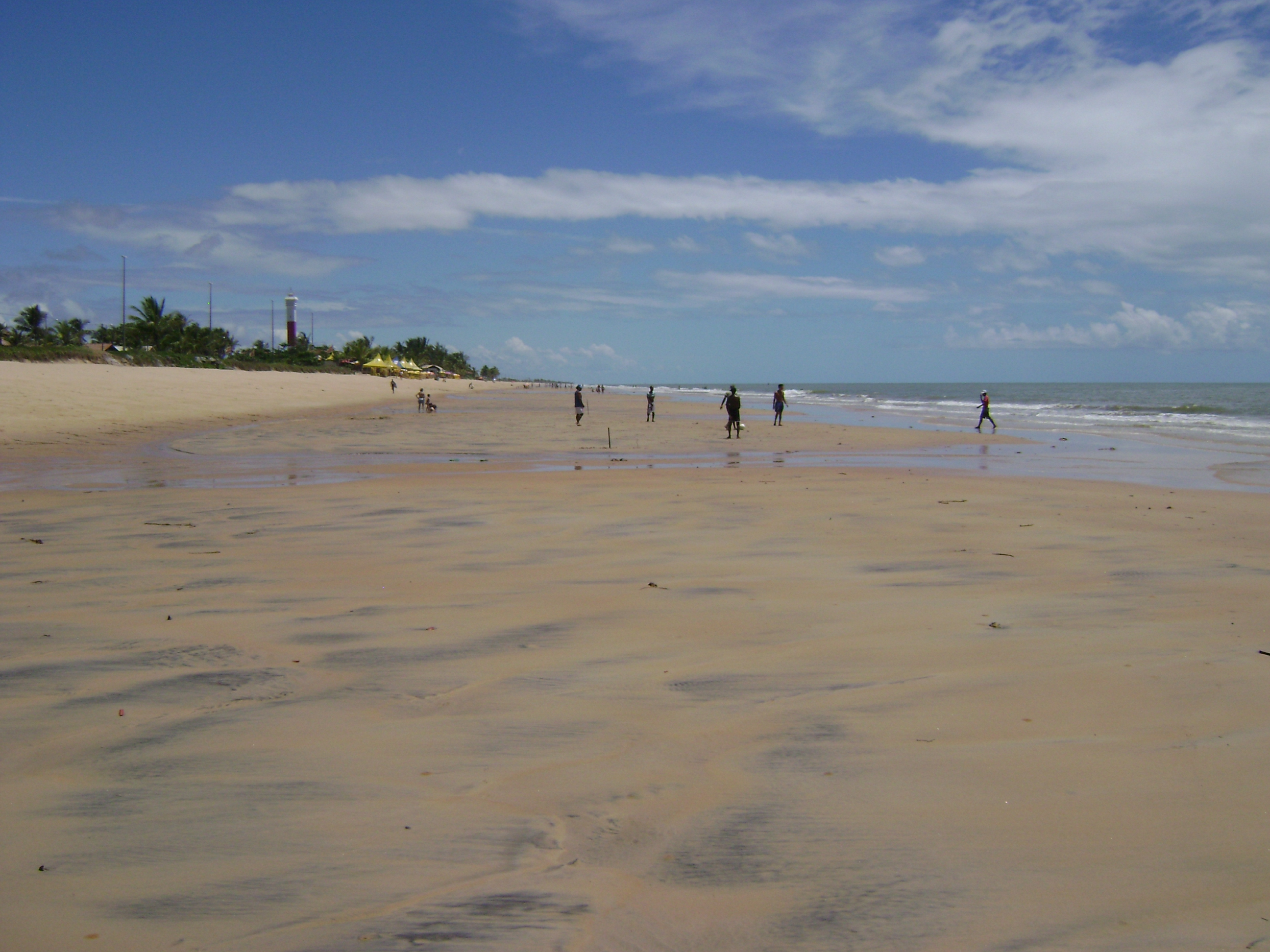 Praia do Farol em Alcobaça.